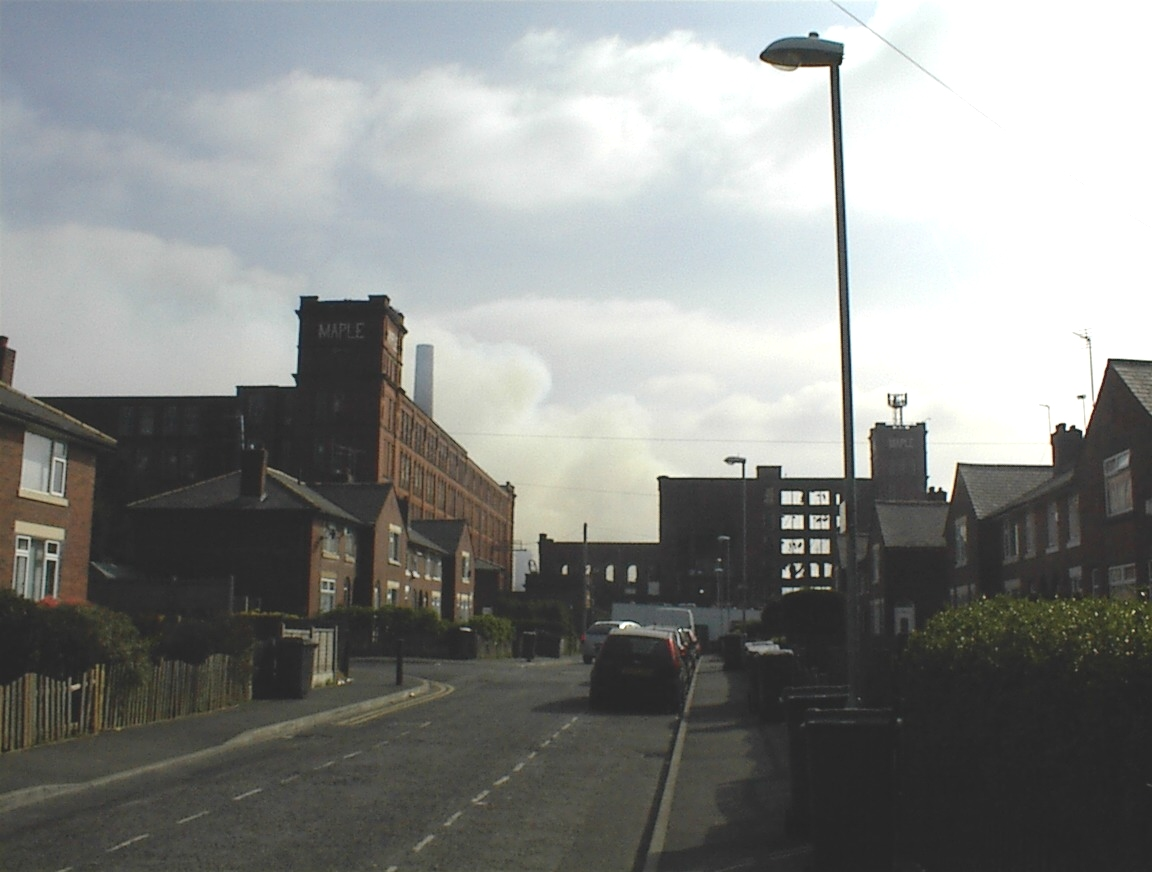 Maple Mill after fire